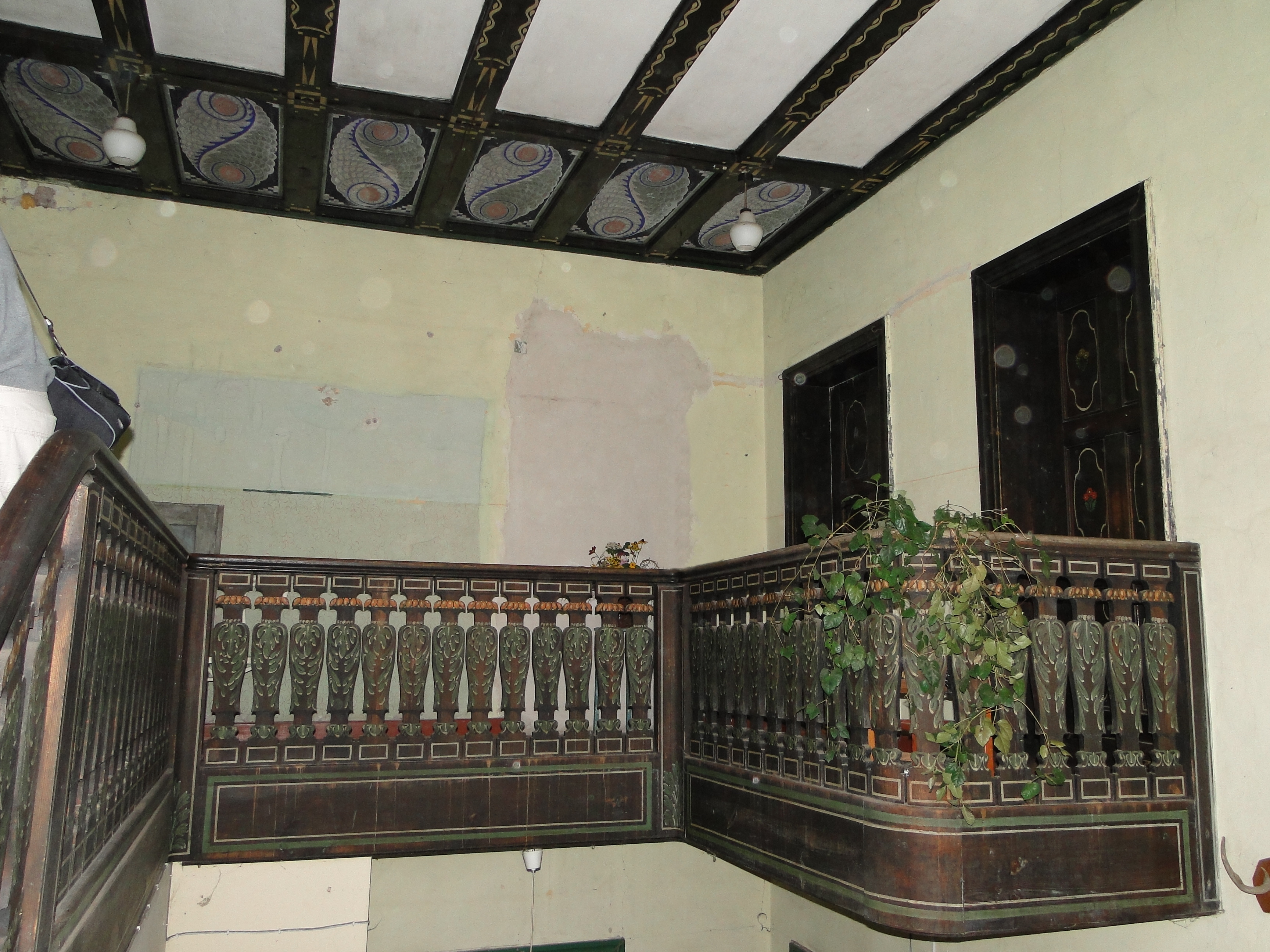 Willa Grünebergów przy ul. Batalionów Chłopskich 61 w Szczecinie (zdjęcie wykonano przed przesunięciem budynku)